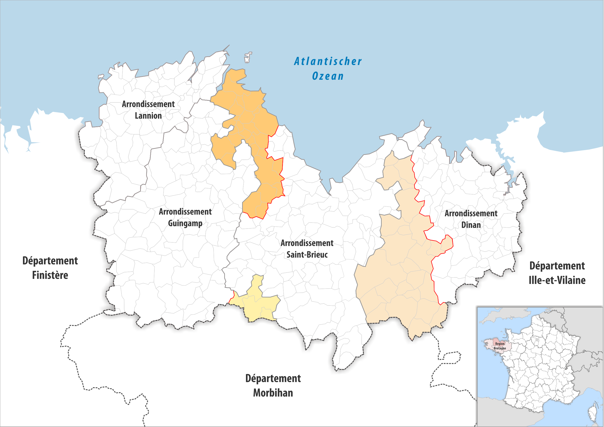 Arrondissements Anpassungen auf 2017 im Departement Côtes-d’Armor